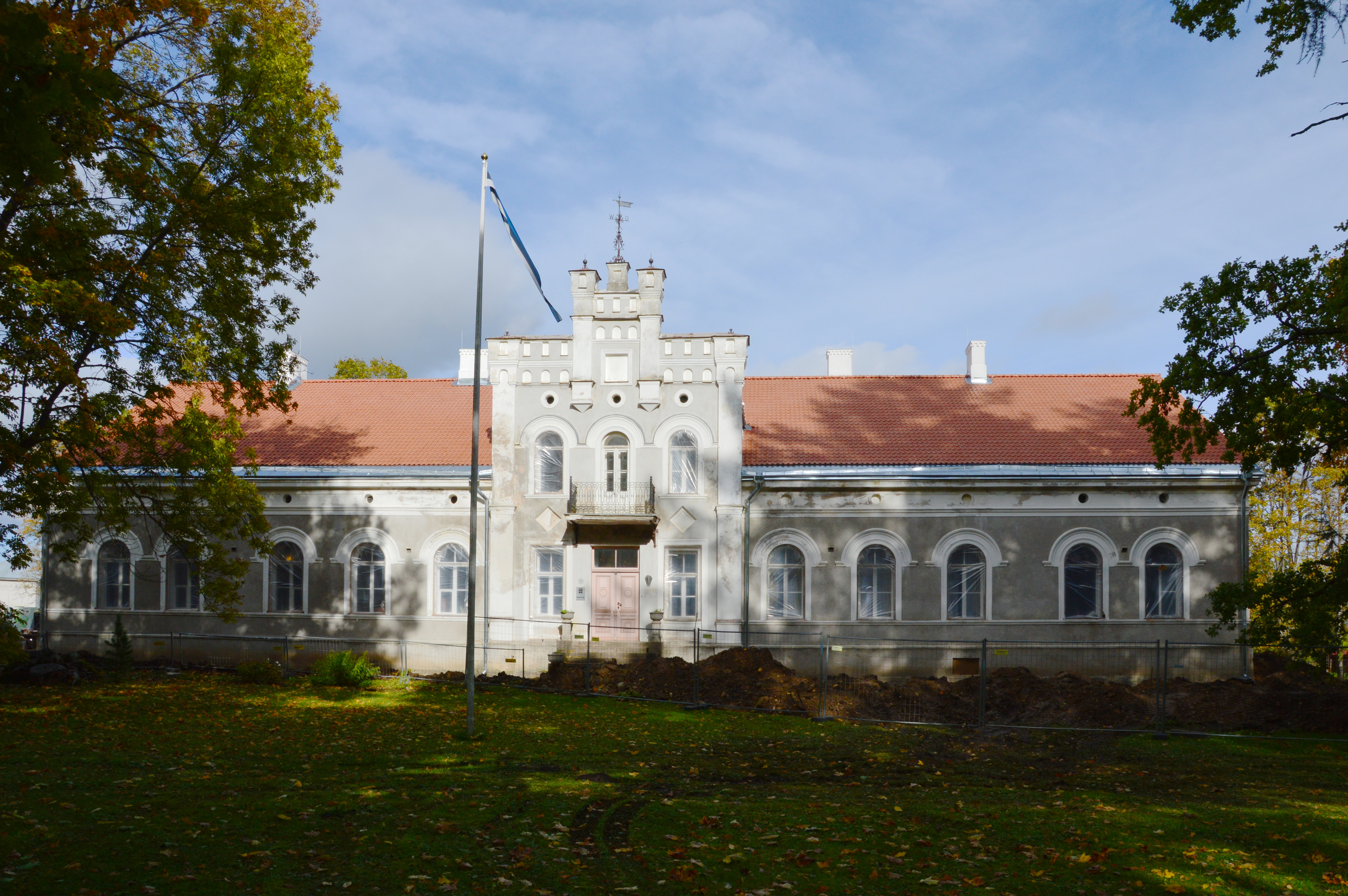 Illuka mõisa peahoone